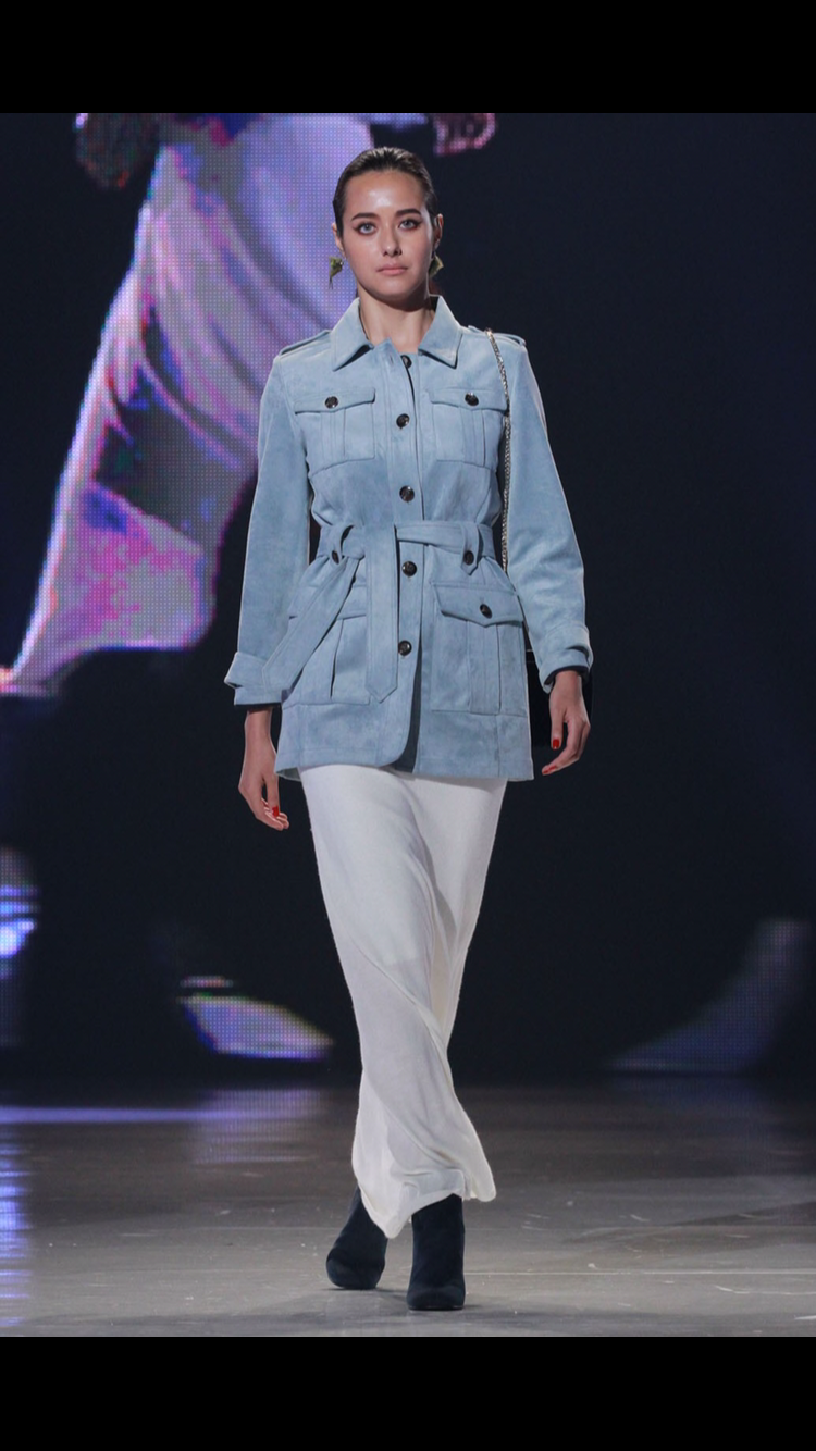 浦浜アリサ(神戸コレクション2015SS)